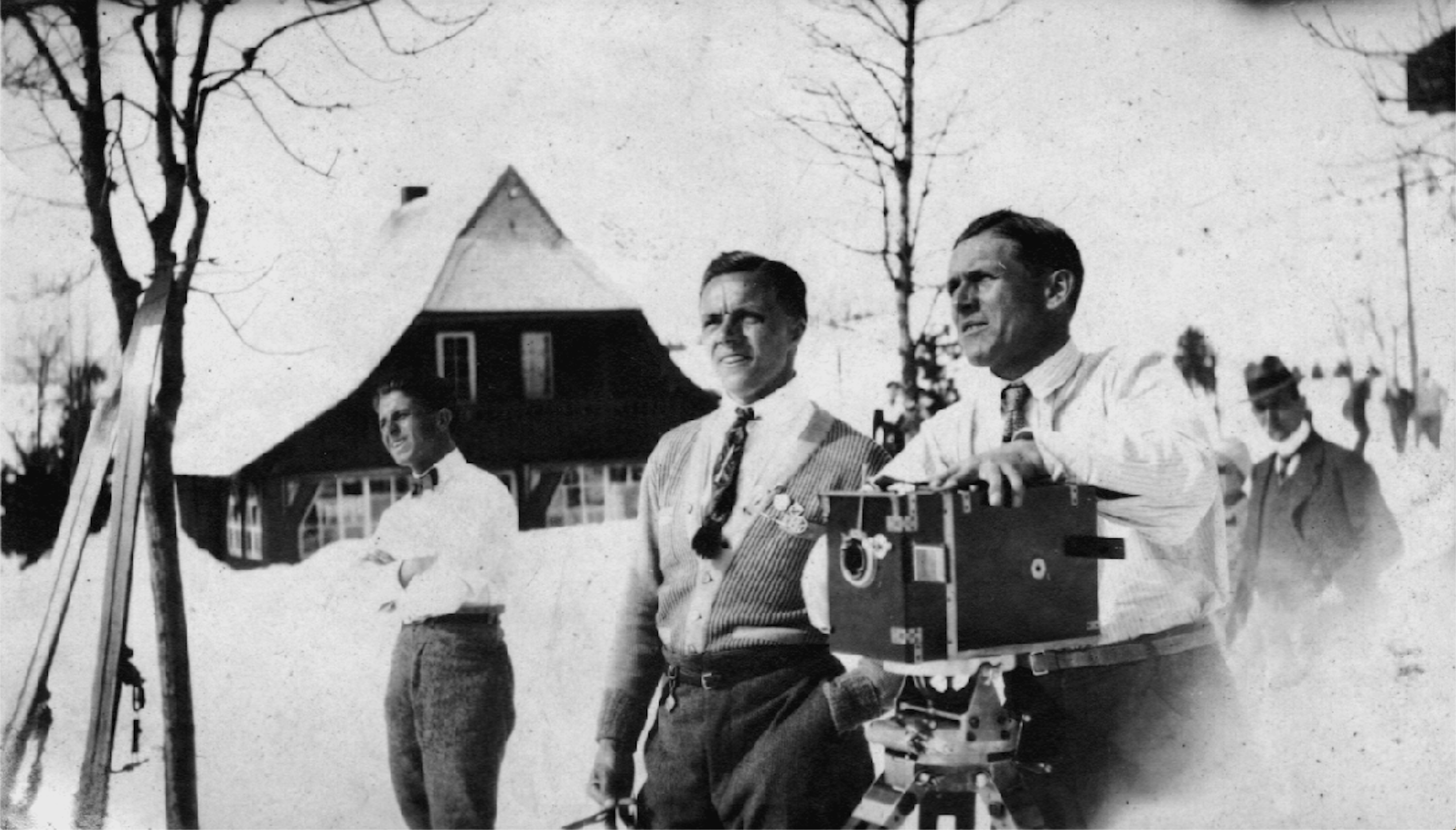 Der deutsche Kameramann Sepp Allgeier (1895–1968) an einer Lyta-Kamera, die von den Lytax-Werken der Apparatebau Freiburg G.m.b.H. gefertigt wurde.